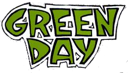 Logo de Green Day en 39/Smooth